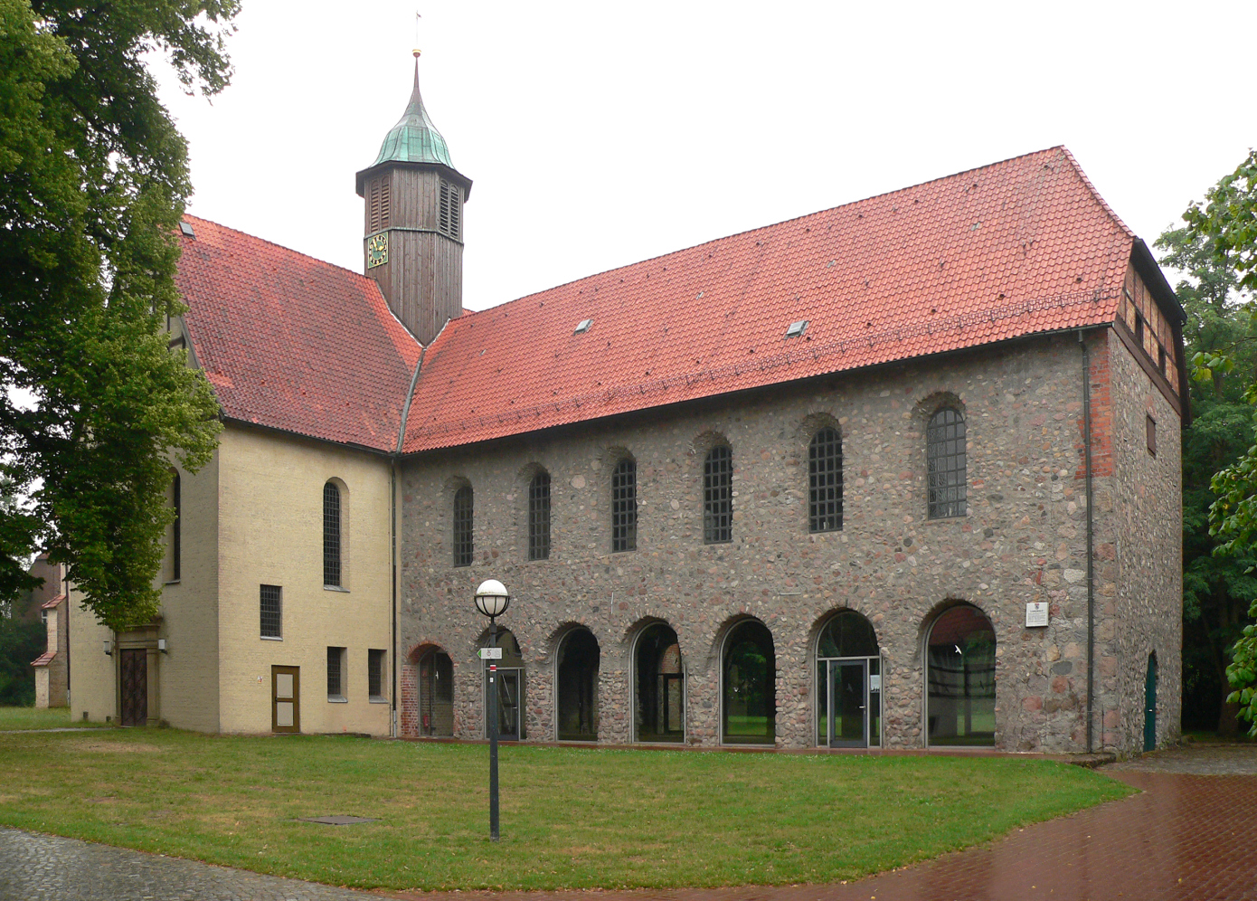 Klosterkirche Oldenstadt, ehemals Kloster Oldenstadt